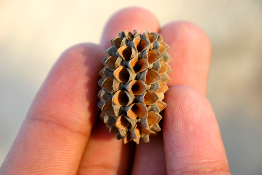 Casuarina seed capsule